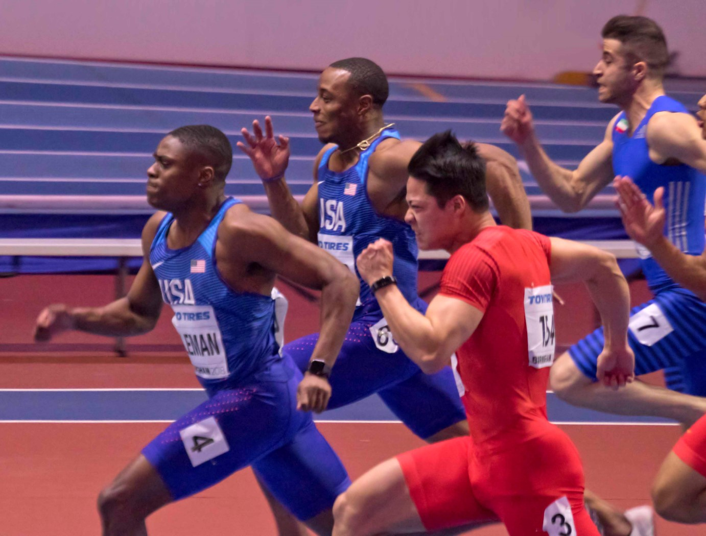 WK3B0325 finale 60m coleman